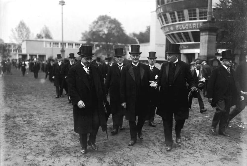 Die Eröffnung der Ausstellung Jahresschau deutscher Arbeit in Dresden! Der sächsische Ministerpräsident Held (x) sowie der russische Botschafter in Berlin Krestinski (XX) im Ausstellungsgelände .